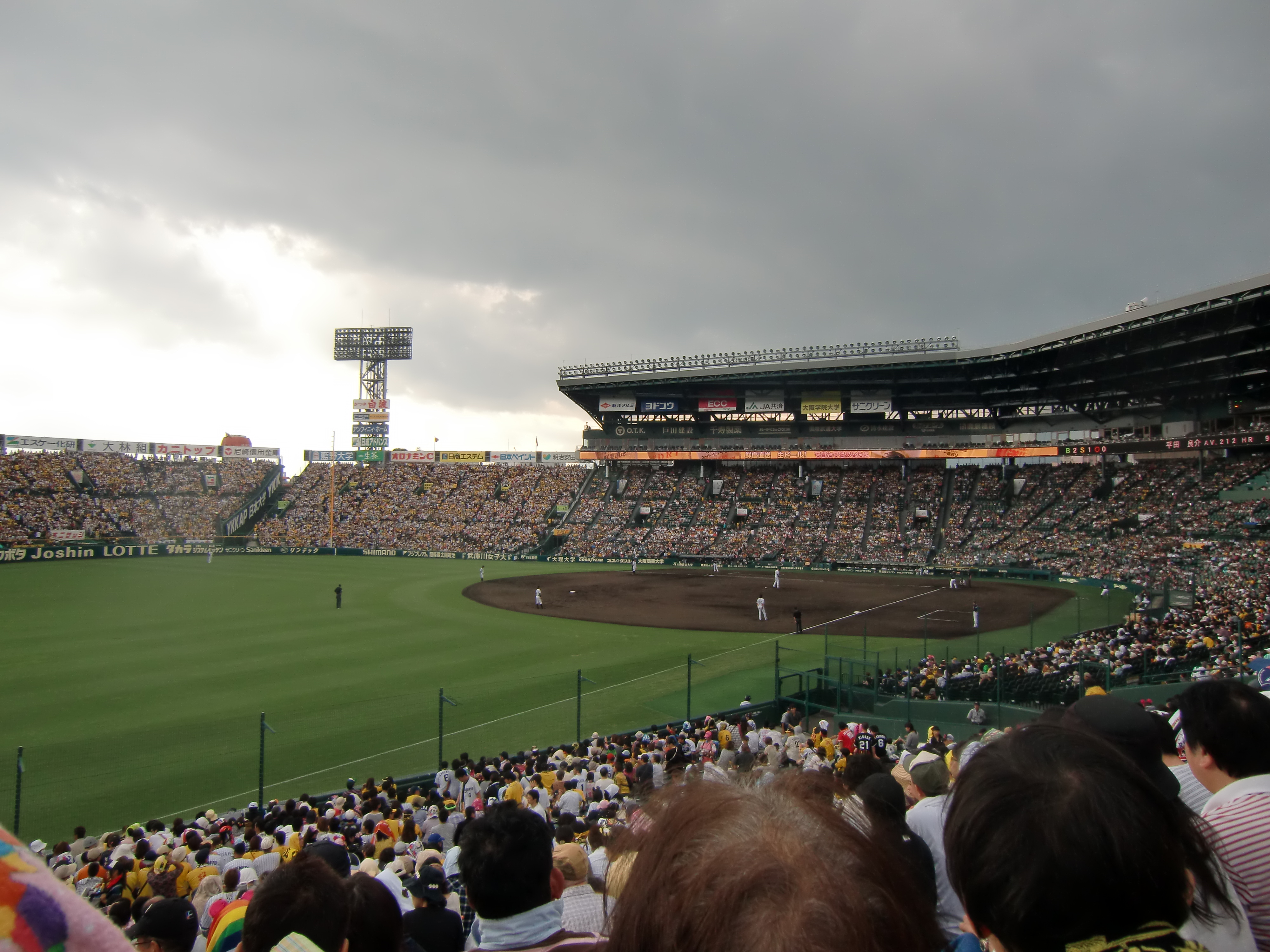 三塁アルプスから見た内野